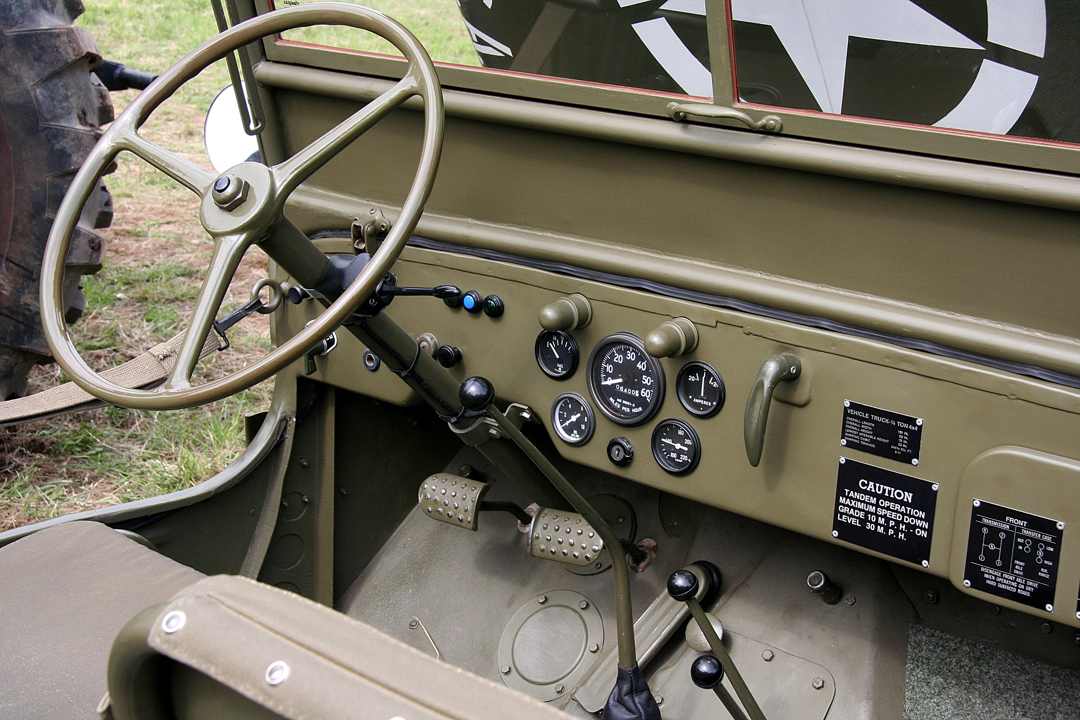 Willys MB, Baujahr 1944, Armaturenbrett